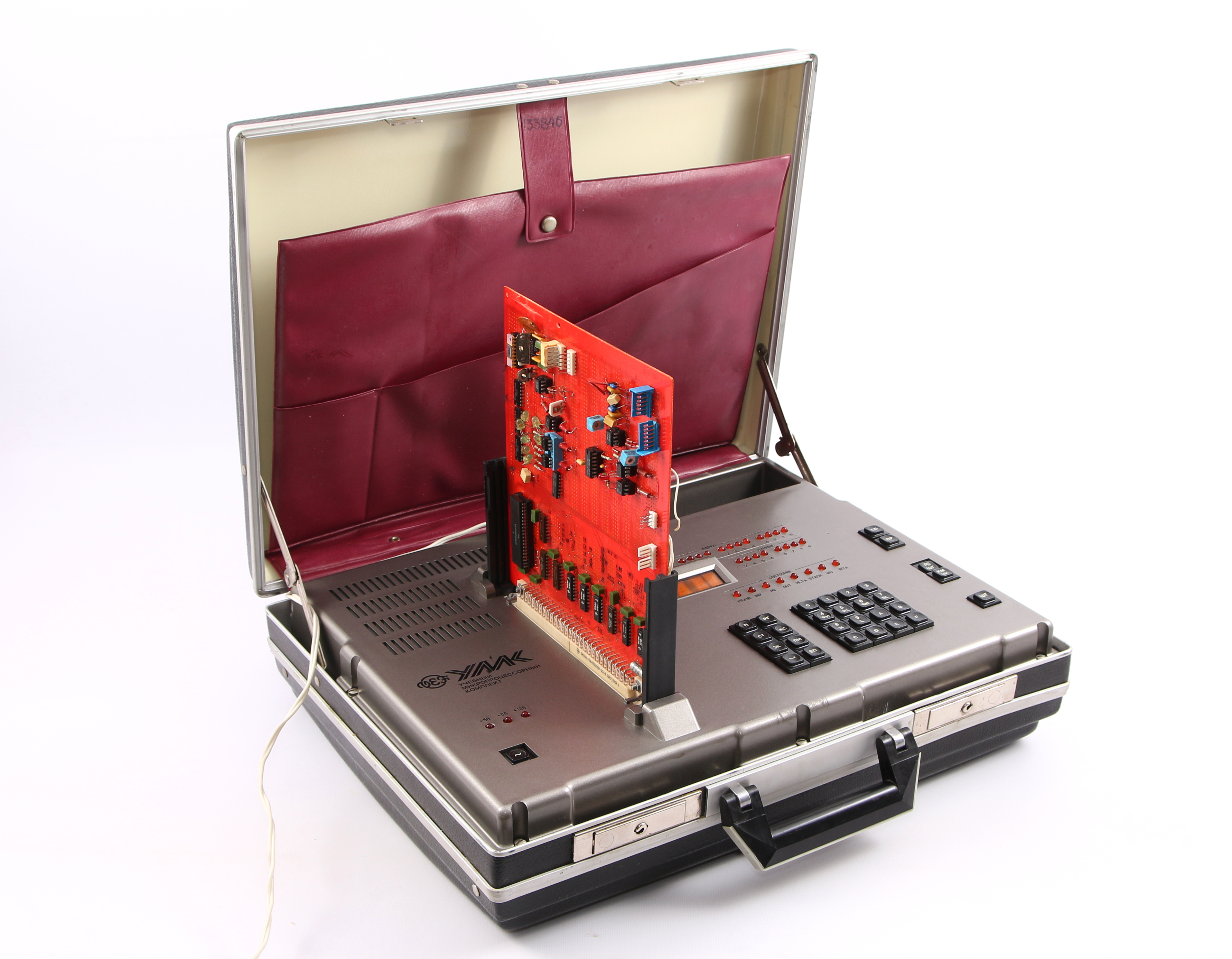 Учебный микропроцессорный комплект производства завода VEF на базе процессора КР580ВМ80А, использовался для целей обучения. В разъем расширения вставлена макетная плата. Произведен в конце 80х.